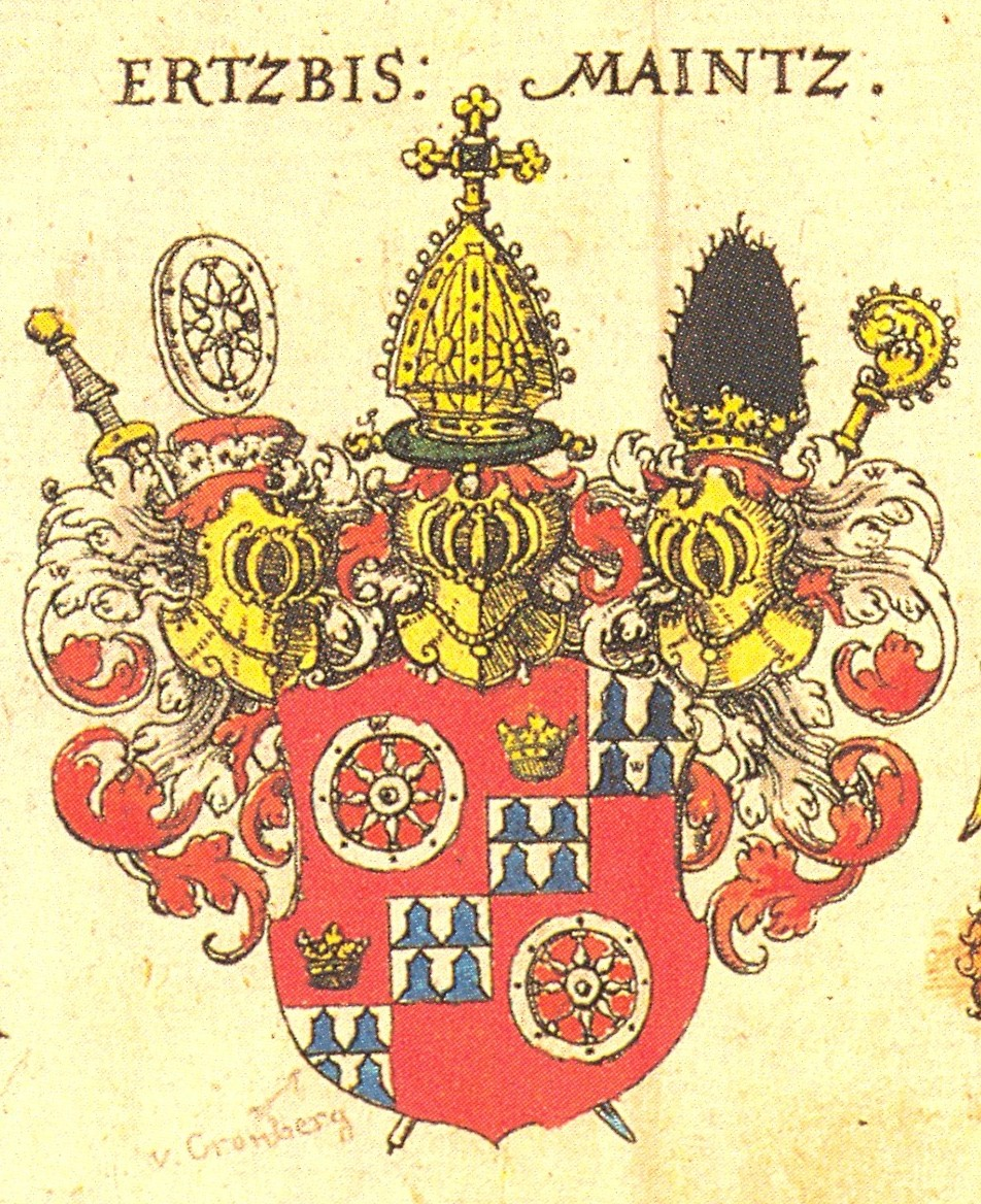 Siebmachers Wappenbuch, Blatt 3, Kurmainz, 1605 (Johann Schweikhard von Kronberg (* 15. Juli 1553; † 17. September 1626, in Aschaffenburg) war von 1604 bis 1626 Erzbischof und Kurfürst von Mainz)